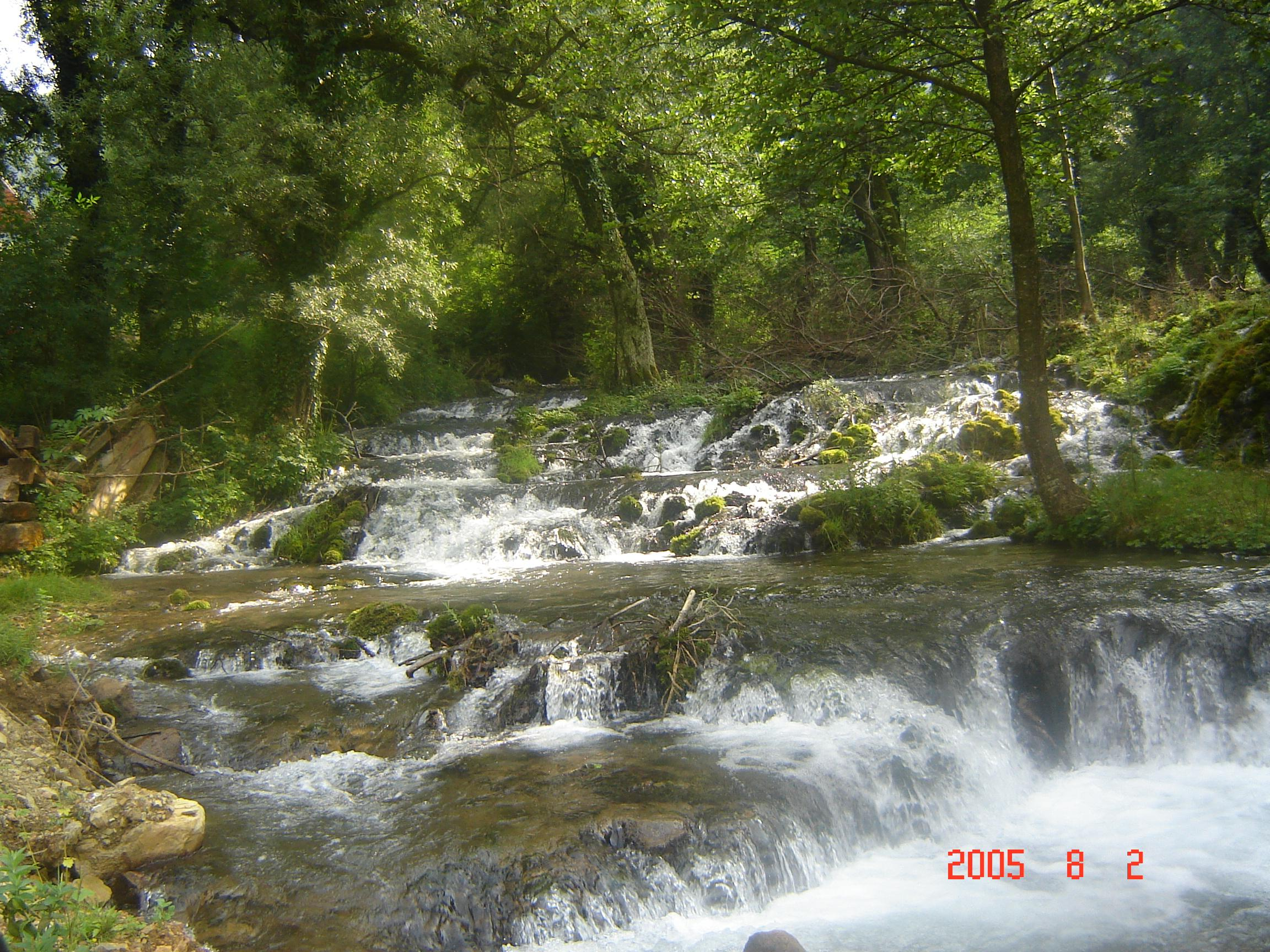 Rijeka Janj. Аутор је Максим Вулета.